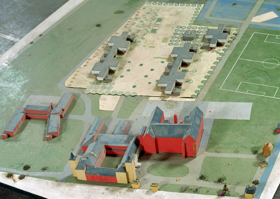 La Grande Suisse: Interieur, maquette in gymzaal